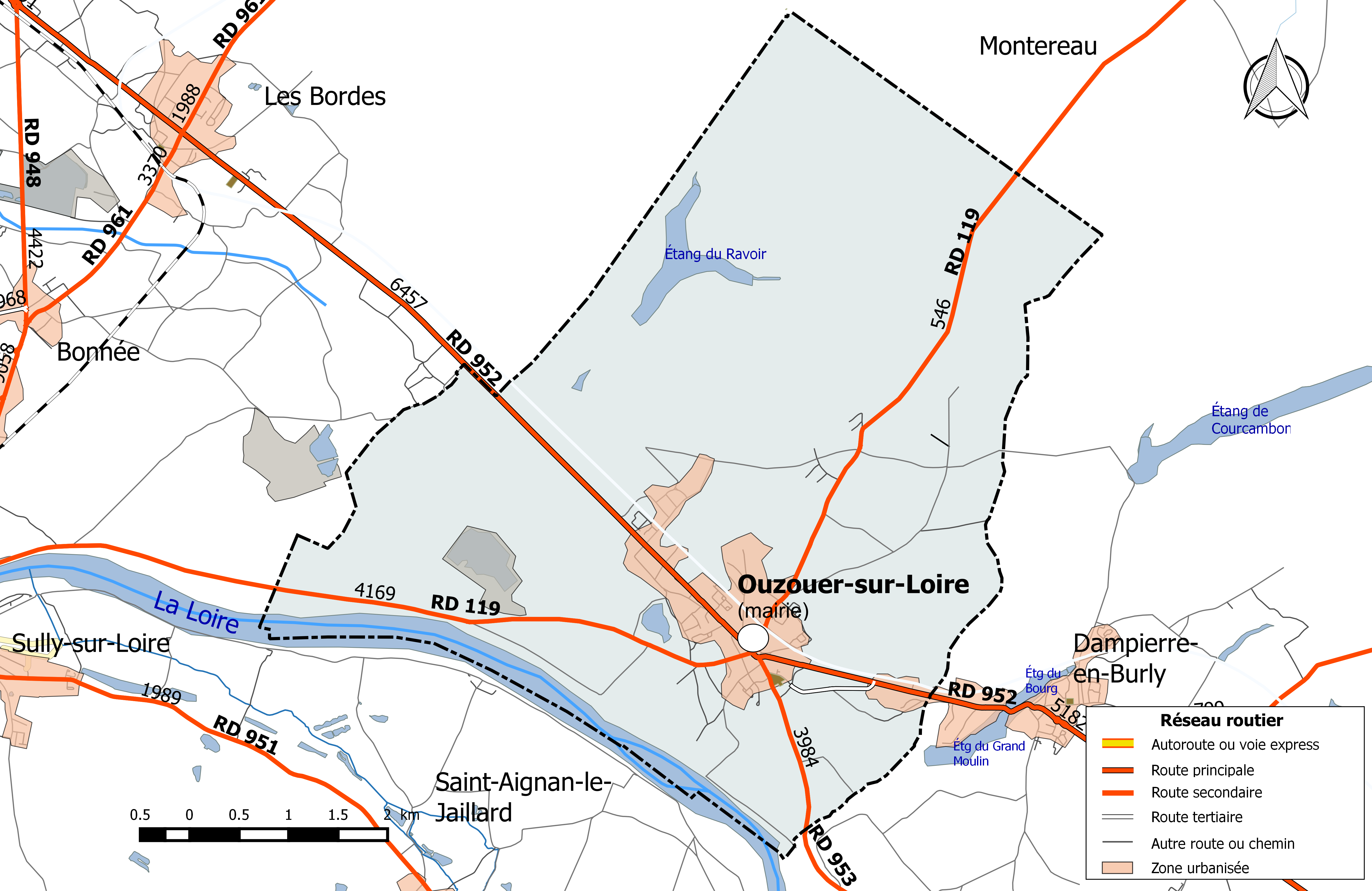 Carte du réseau routier de la commune de Ouzouer-sur-Loire.